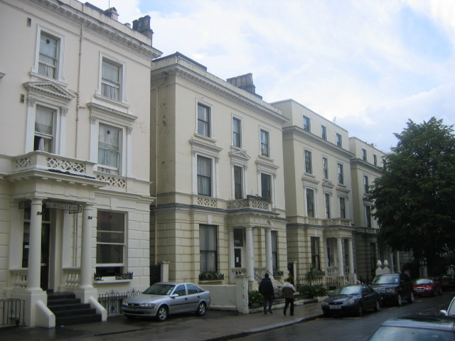 London : Notting Hill, Pembridge Gardens